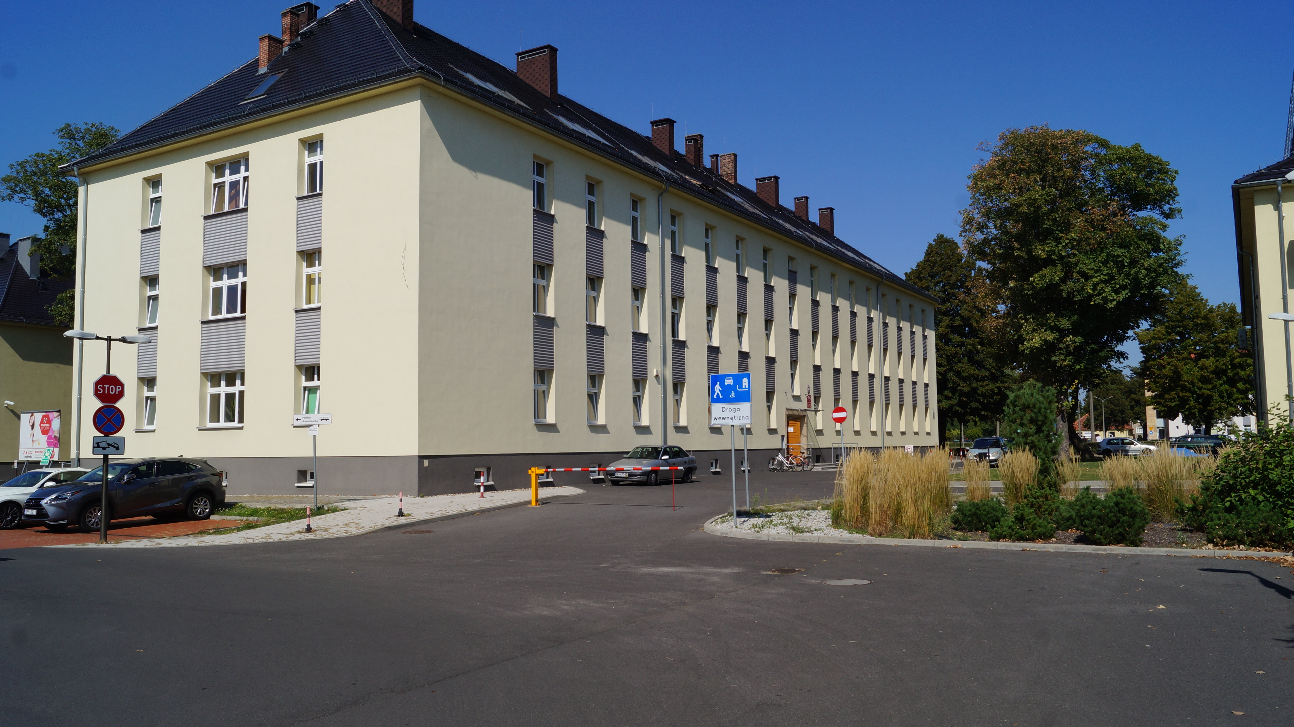 Tato budova je sídlem opolského muzea rentgenek.